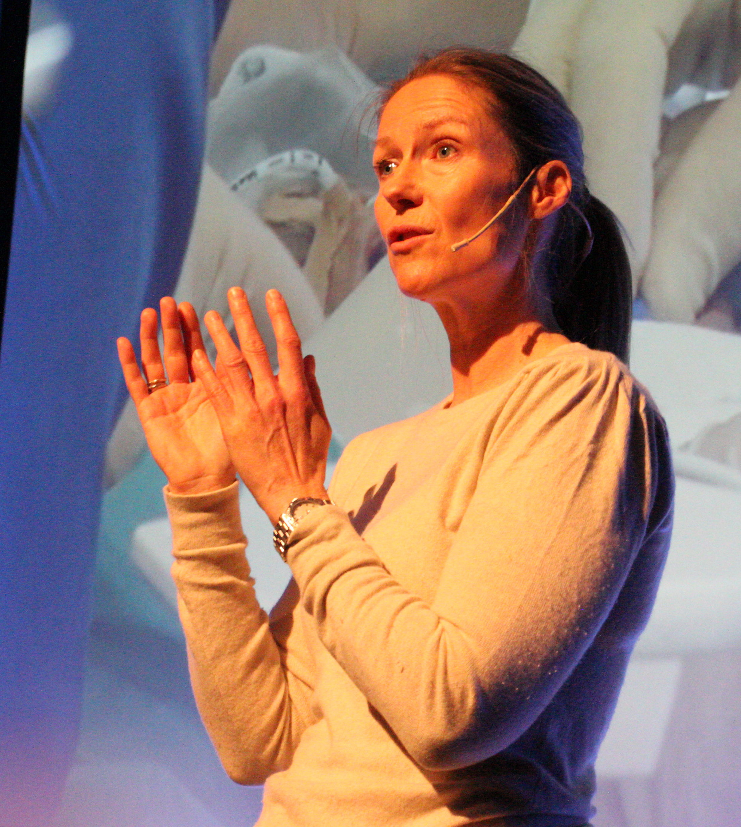 Helene sjekker inn, Nordiske mediedager 2019